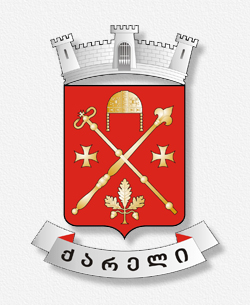 ქარელის მუნიციპალიტეტის გერბი